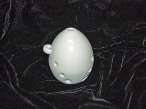 Hun coreano